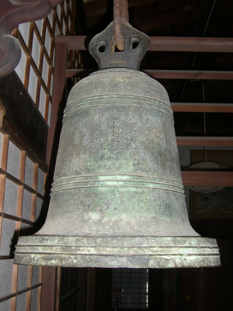 Takafumi Kawakami